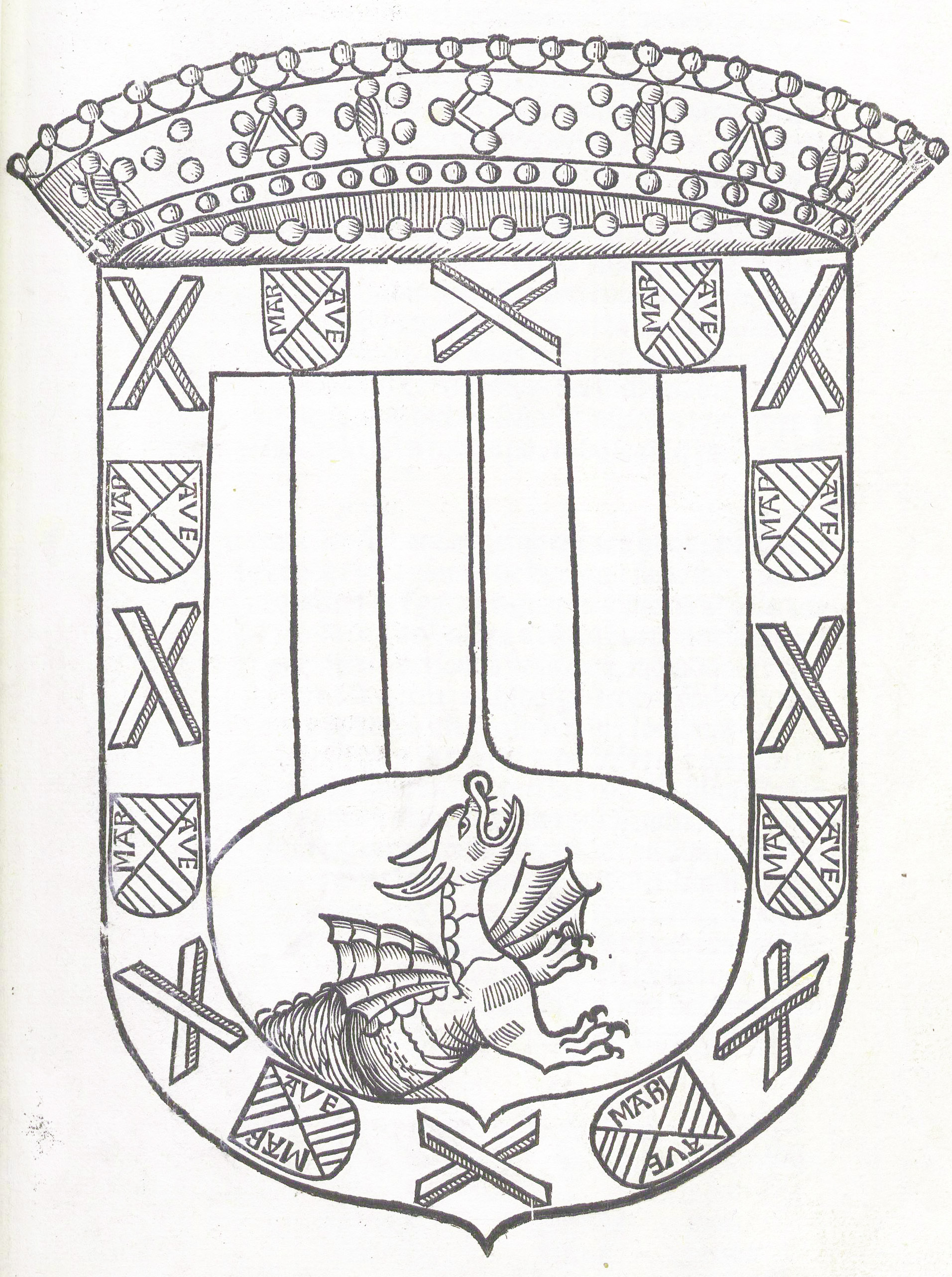 Escudo del II Duque Alburquerque custodiado en las Ordenanzas de villa y tierra de Cúellar del archivo de Santibáñez de Valcorba, Valladolid, España